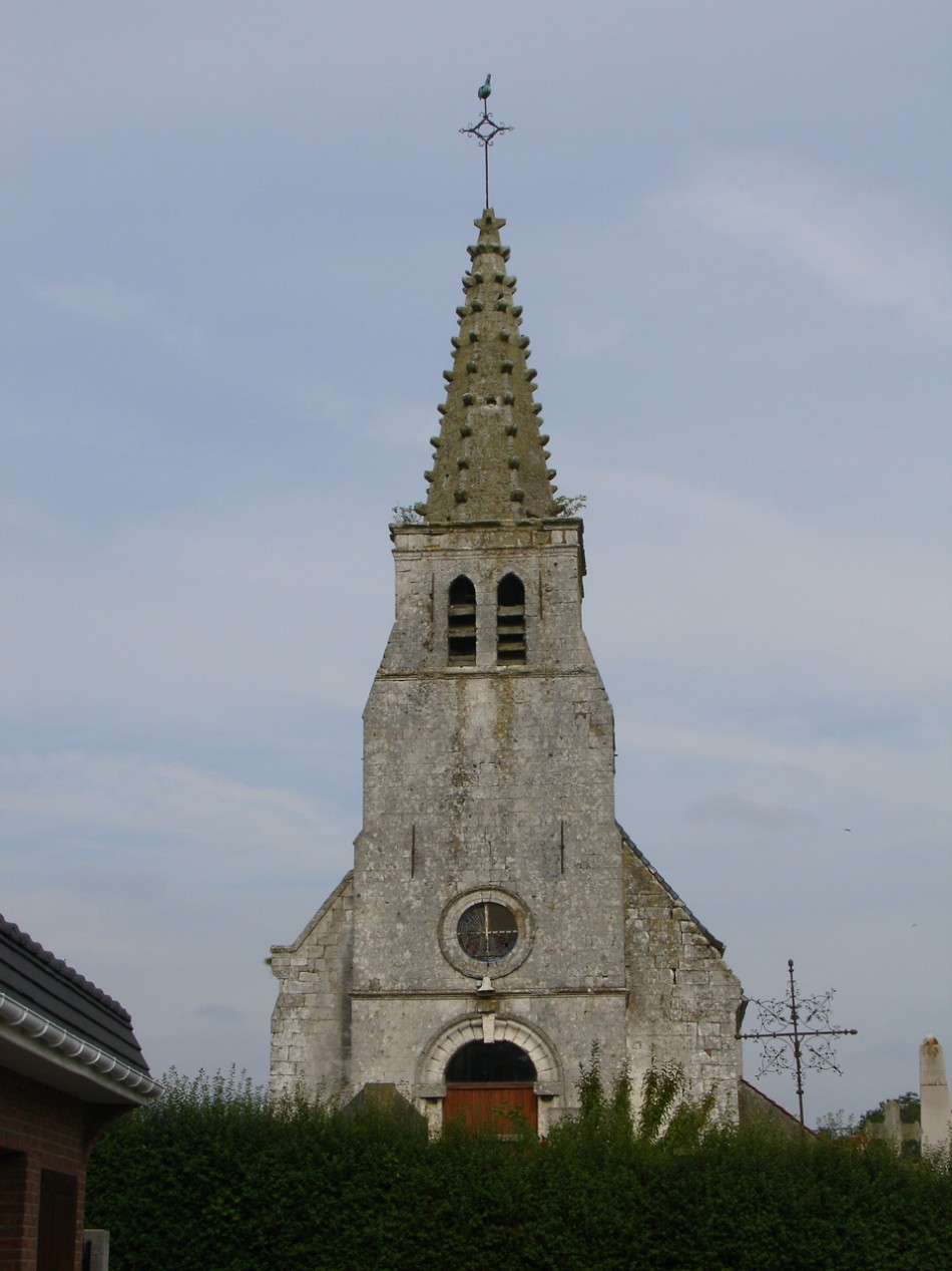 Église de Nort-Leulinghem